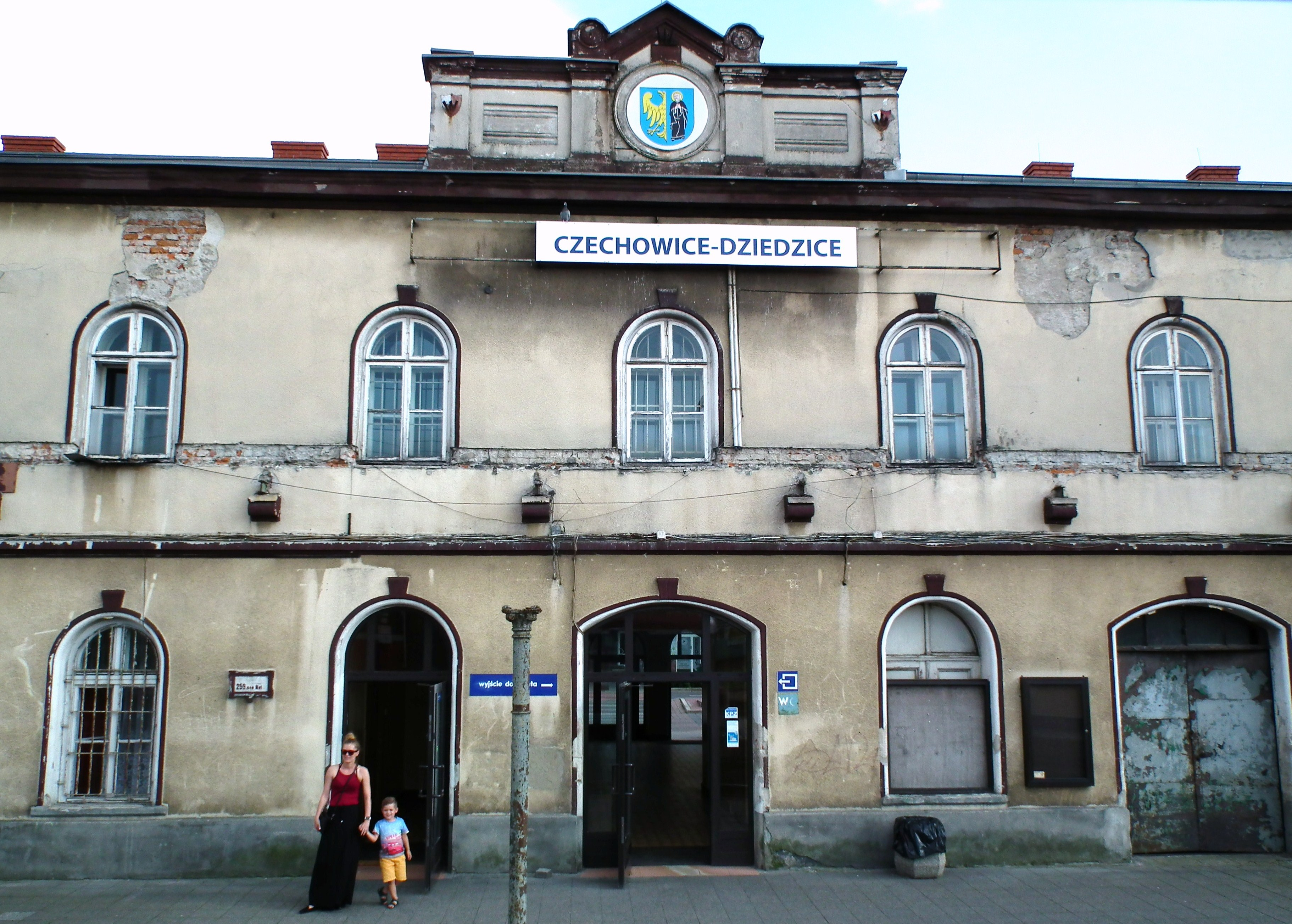 Czechowice-Dziedzice - dworzec kolejowy.